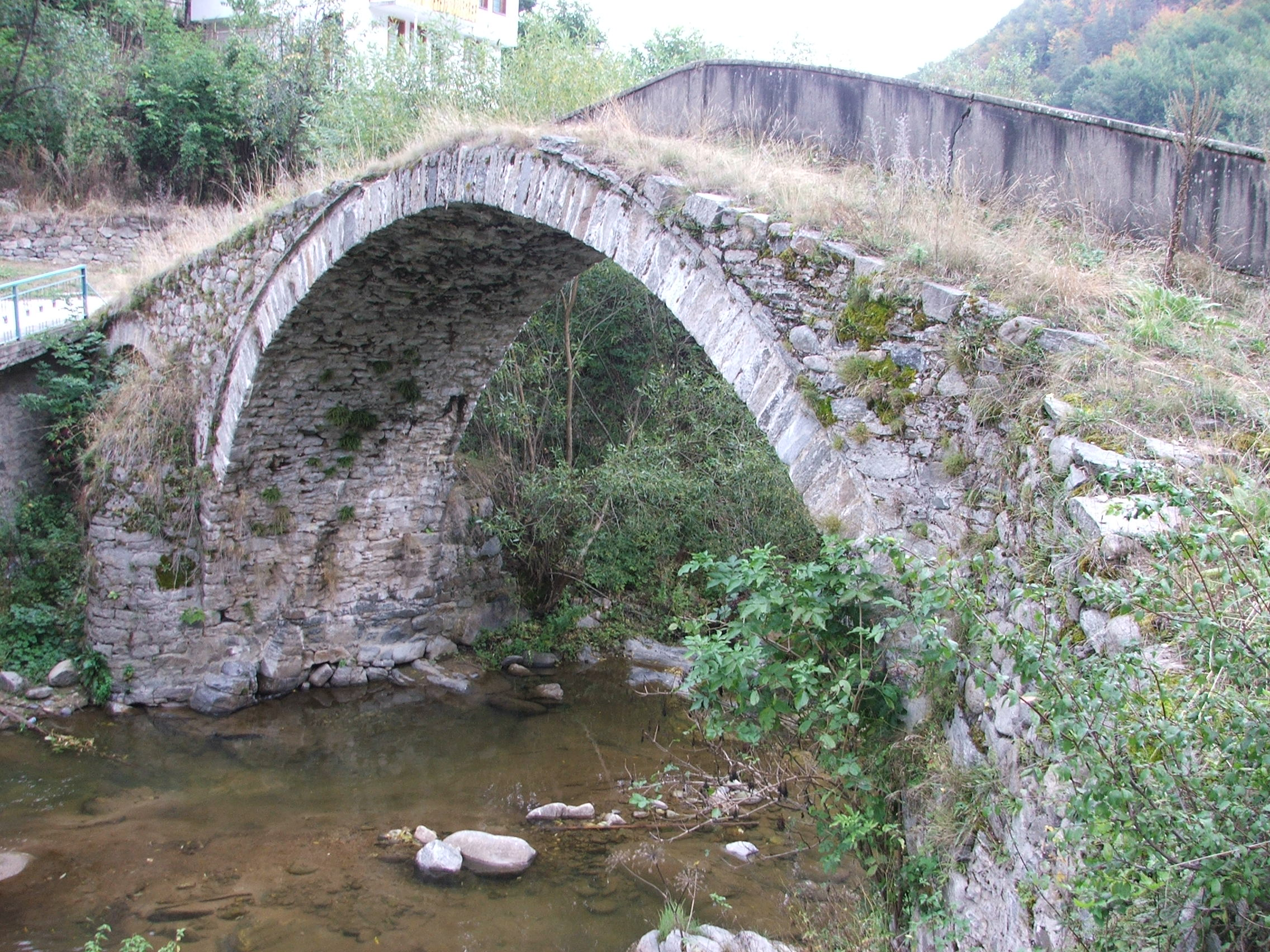 Един от римските мостове в село Петково, област Смолян.